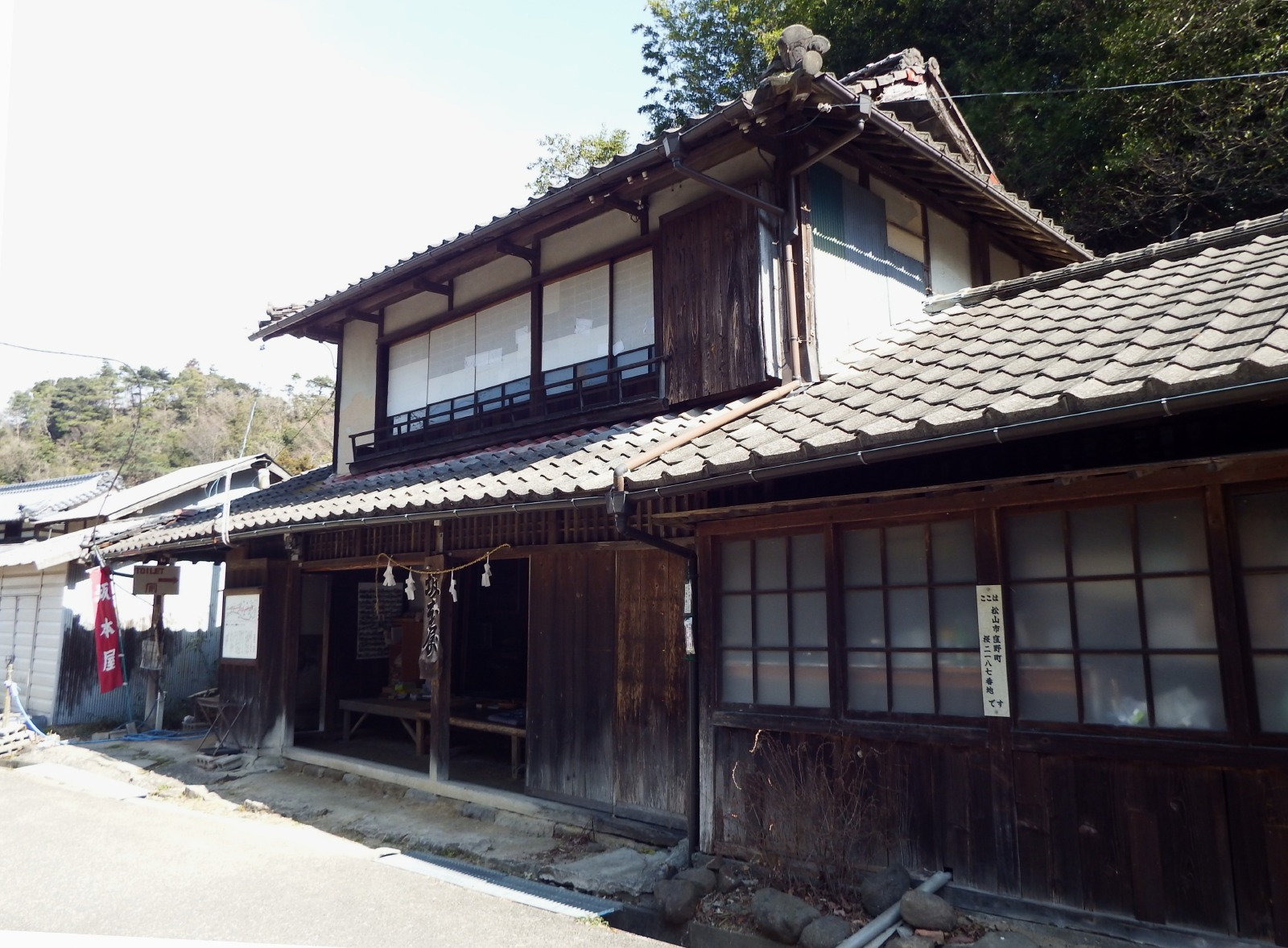 三坂峠から下ったところにある坂本屋